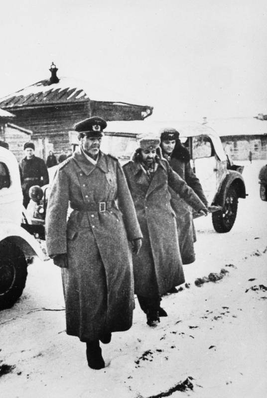 Russland, Paulus in Kriegsgefangenschaft ADN-ZB/TASS II. Weltkrieg 1939-45 Schlacht um Stalingrad vom Juli 1942 bis Februar 1943 Der kriegsgefangene Generalfeldmarschall Friedrich Paulus (l.), bisher Oberbefehlshaber der faschistischen 6. Armee in Stalingrad, trifft am 31.1.1943 mit seinem Stabschef, Generalleutnant Arthur Schmidt (m.), und seinen Adjutanten, Oberst Wilhelm Adam, beim Stab der sowjetischen 64. Armee in Beketowka ein. Aufnahme Lipskerow Abgebildete Personen: Paulus, Friedrich: Generalfeldmarschall, Oberbefehlshaber 6. Armee, Ritterkreuz (RK), Heer, Deutschland (GND 118739654) Schmidt, Arthur: Generalleutnant, Ritterkreuz (RK), Heer, Deutschland Adam, Wilhelm: Adjutant von Gen. Paulus (GND 118500554) Information added by Wikimedia users.EN Translation: ADN-ZB/TASS Second World War 1939-45 Battle of Stalingrad from July 1942 to February 1943: The prisoners of war, Field Marshal Friedrich Paulus (left), former commander of the fascist 6th Army at Stalingrad with his chief of staff, Major General Arthur Schmidt (center), and his aide, Colonel William Adam, meet the staff of the Soviet 64th Army at Beketovka on 01.31.1943. Photo: Lipskerow